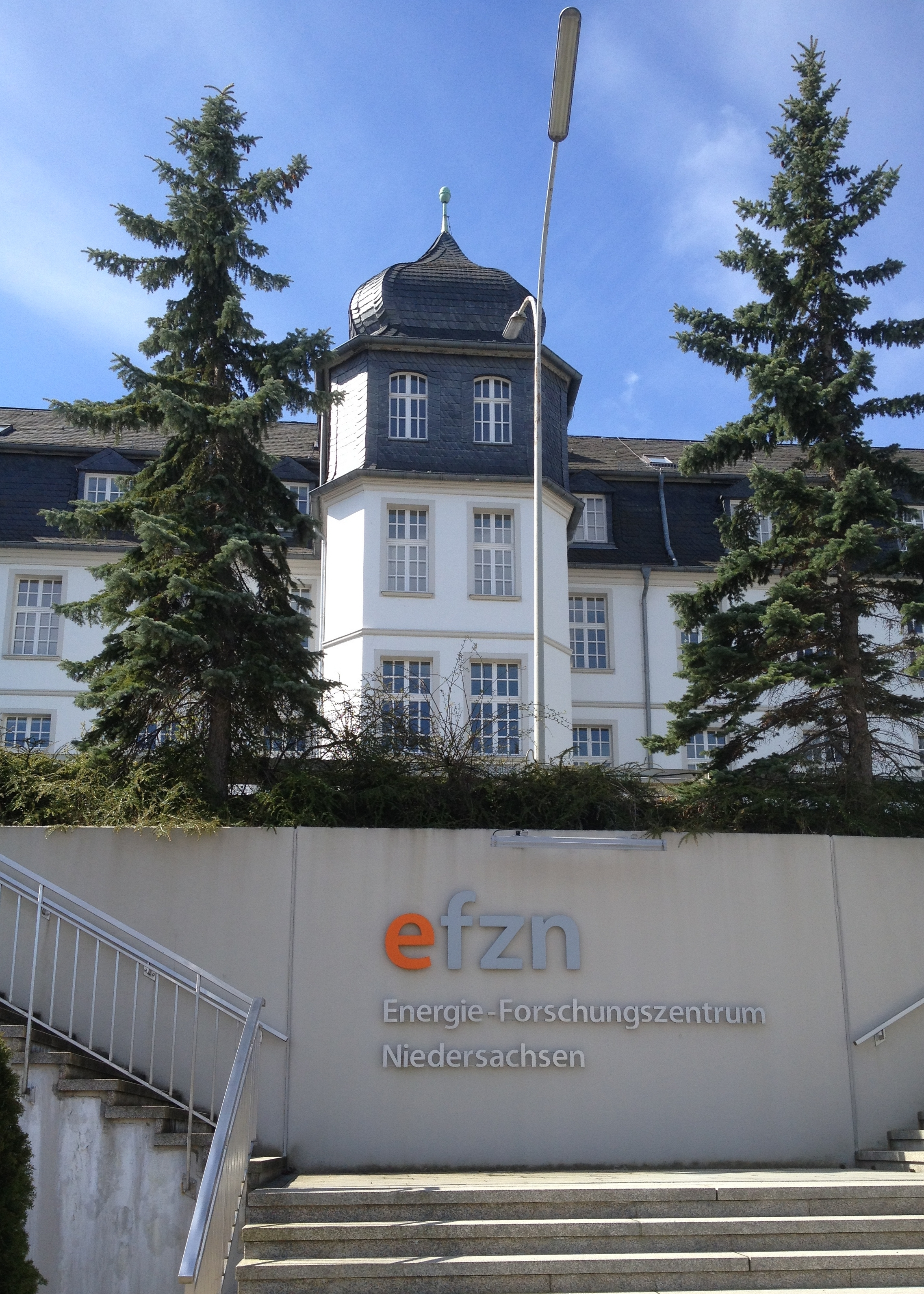 Rammelsberg-Kaserne, Goslar, seit 2010 EnergieCampus Goslar